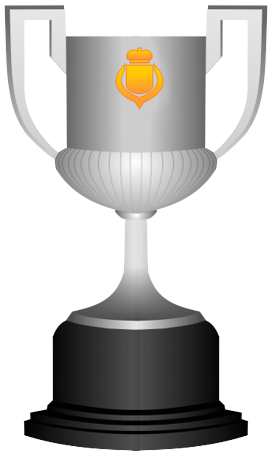 Trofeo Coppa del Re *Immagine disegnata da Riccardo de Conciliis